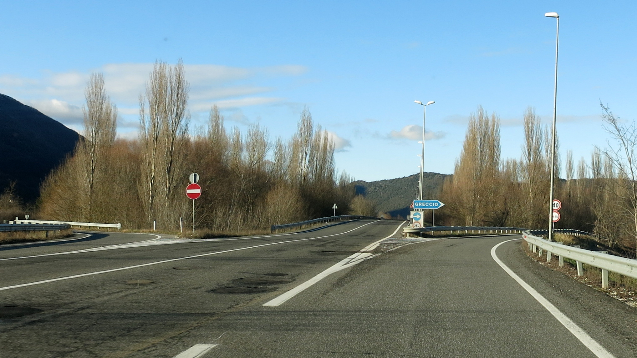 Svincolo di Greccio posto sulla strada statale 79 Ternana (superstrada Rieti-Terni) fotografato in direzione Terni